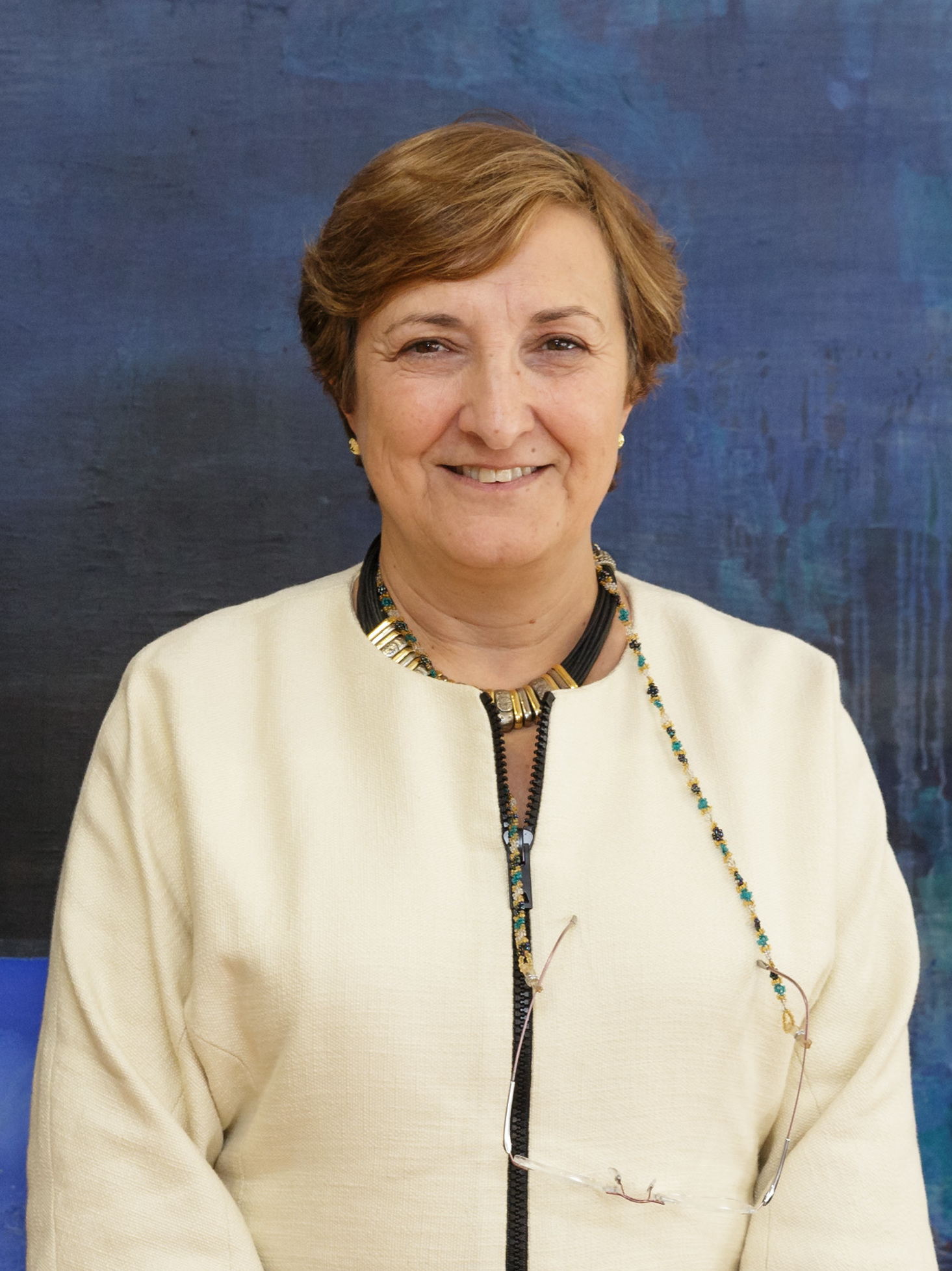 La consejera de Sanidad y el también director de Deusto Business School Health, han intercambiado impresiones sobre aspectos de la sanidad pública